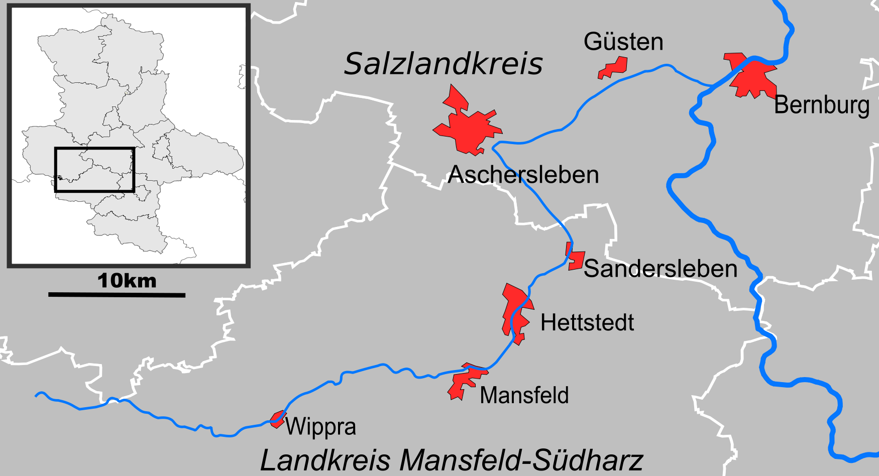 Verlaufskarte der Wipper (Harz)